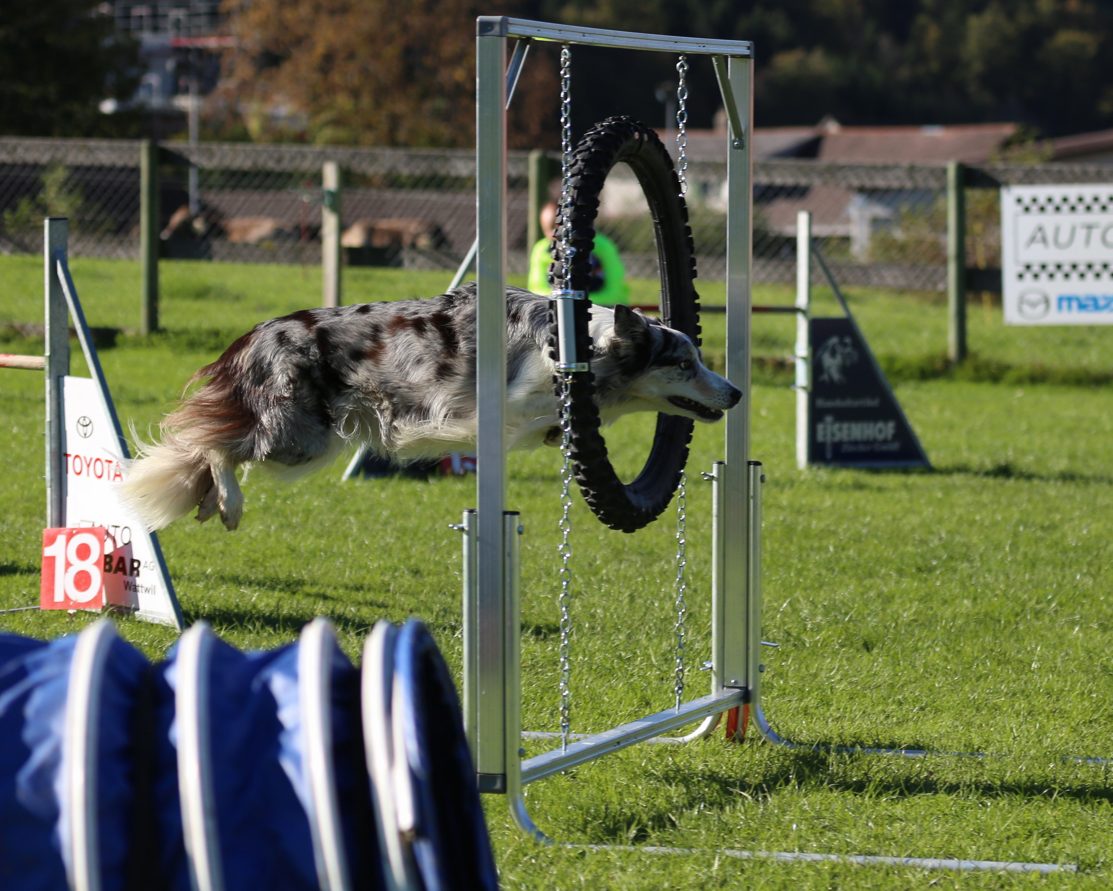 Agility-Wettkampf in der Ostschweiz – Sprung durch den Reifen